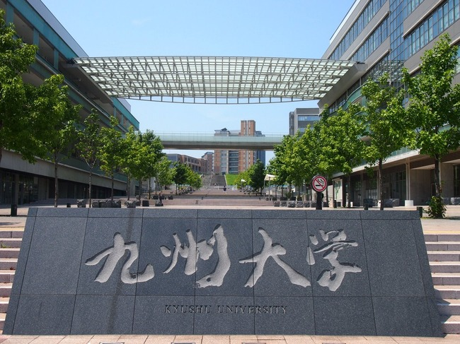 国立大学法人 九州大学